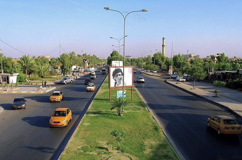 شارع فلسطين في جانب الرصافة من بغداد عام 2011